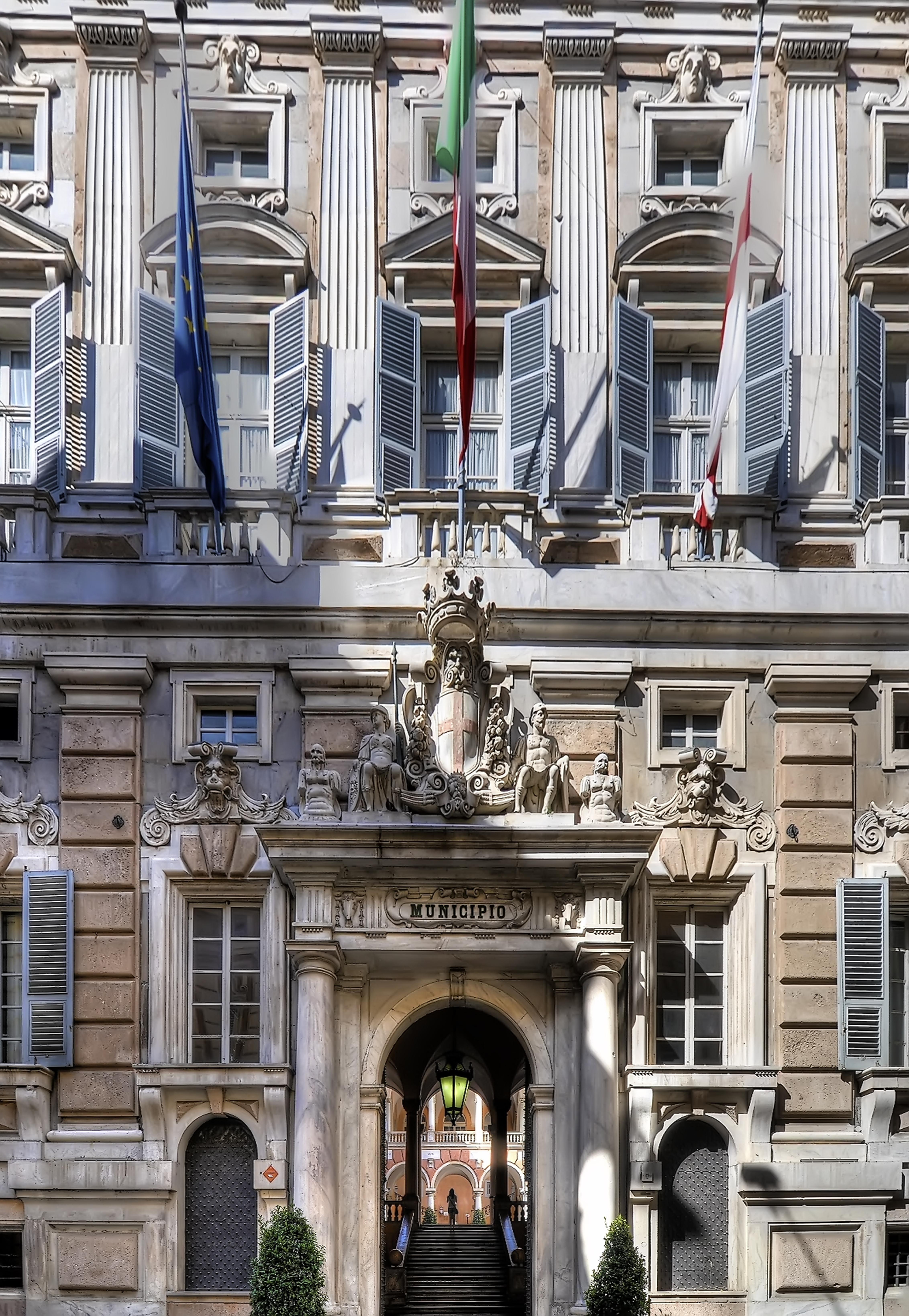 Palazzo Doria-Tursi - Musei di Strada Nuova This is a photo of a monument which is part of cultural heritage of Italy.